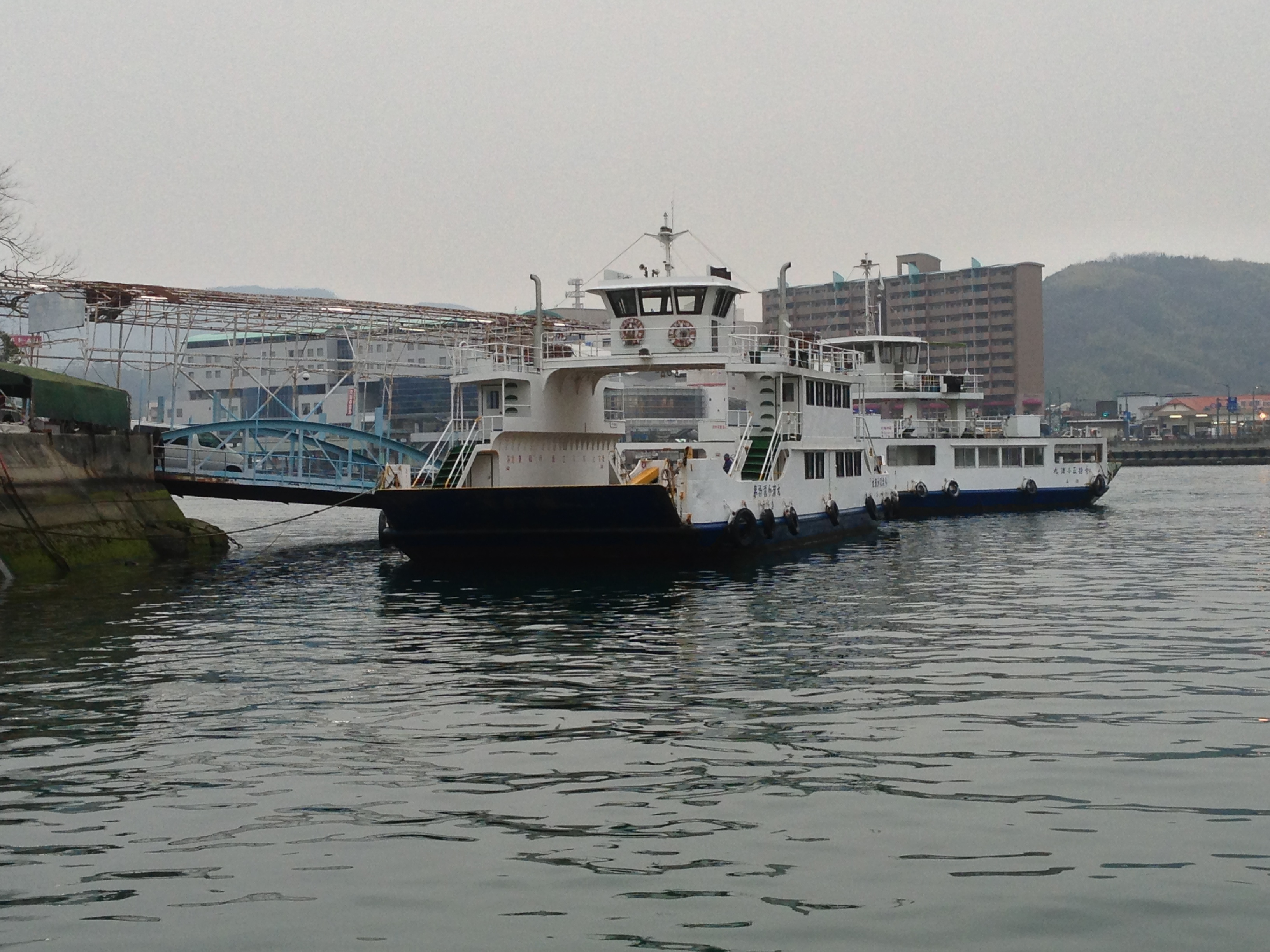 尾道水道で運航されている福本渡船(フェリー）